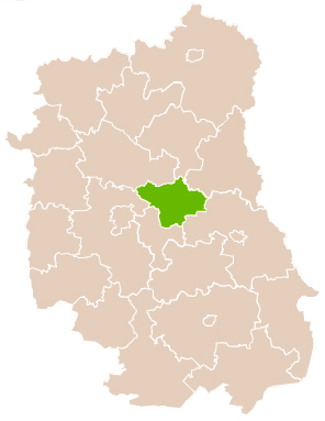 Map of Łęczna county, Lublin voivodship Mapa powiatu łęczyńskiego, województwo lubelskie